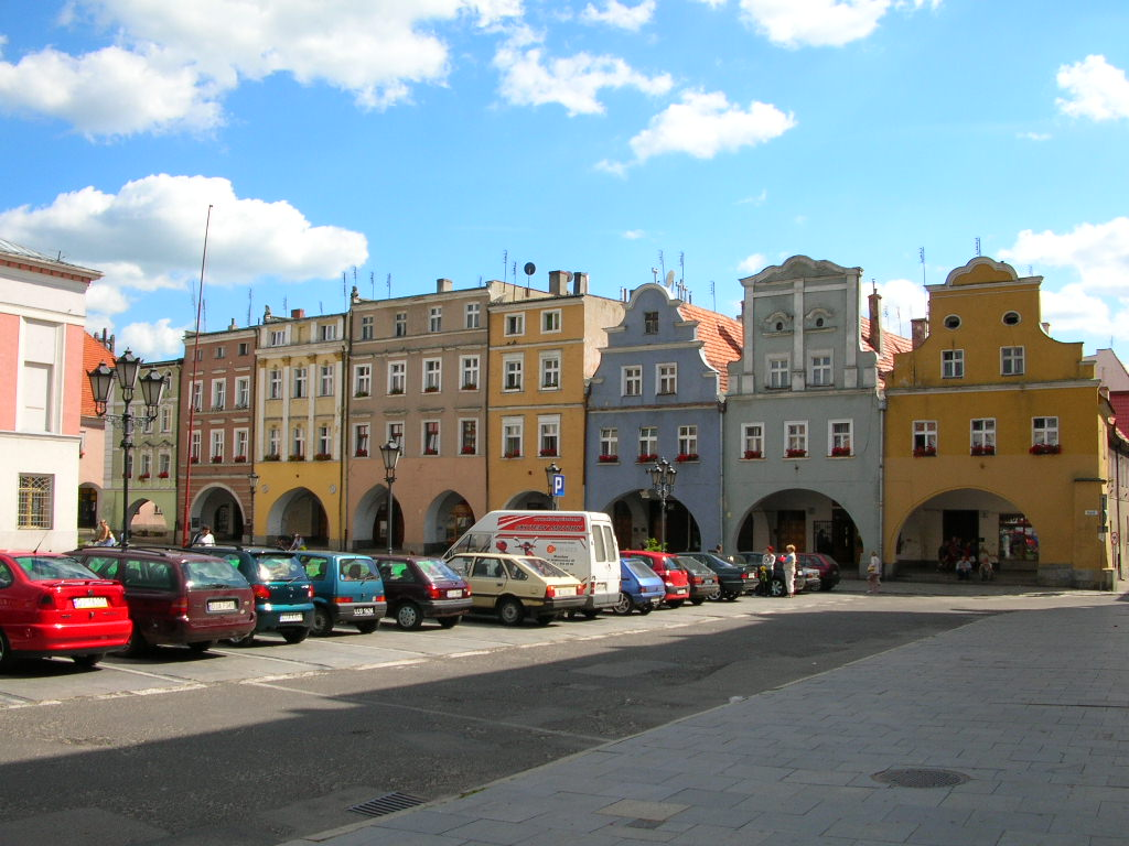 Jawor - Rynek (układ urbanistyczny)